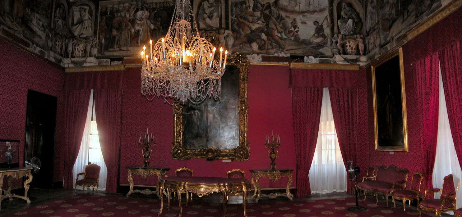 La Valletta, Malta, l'interno del Palazzo del Grande Maestro. Foto scattata da Stefano Trezzi e rilasciata sotto Creative Commons.